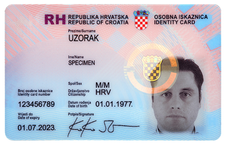 Uzorak osobne iskaznice 2013